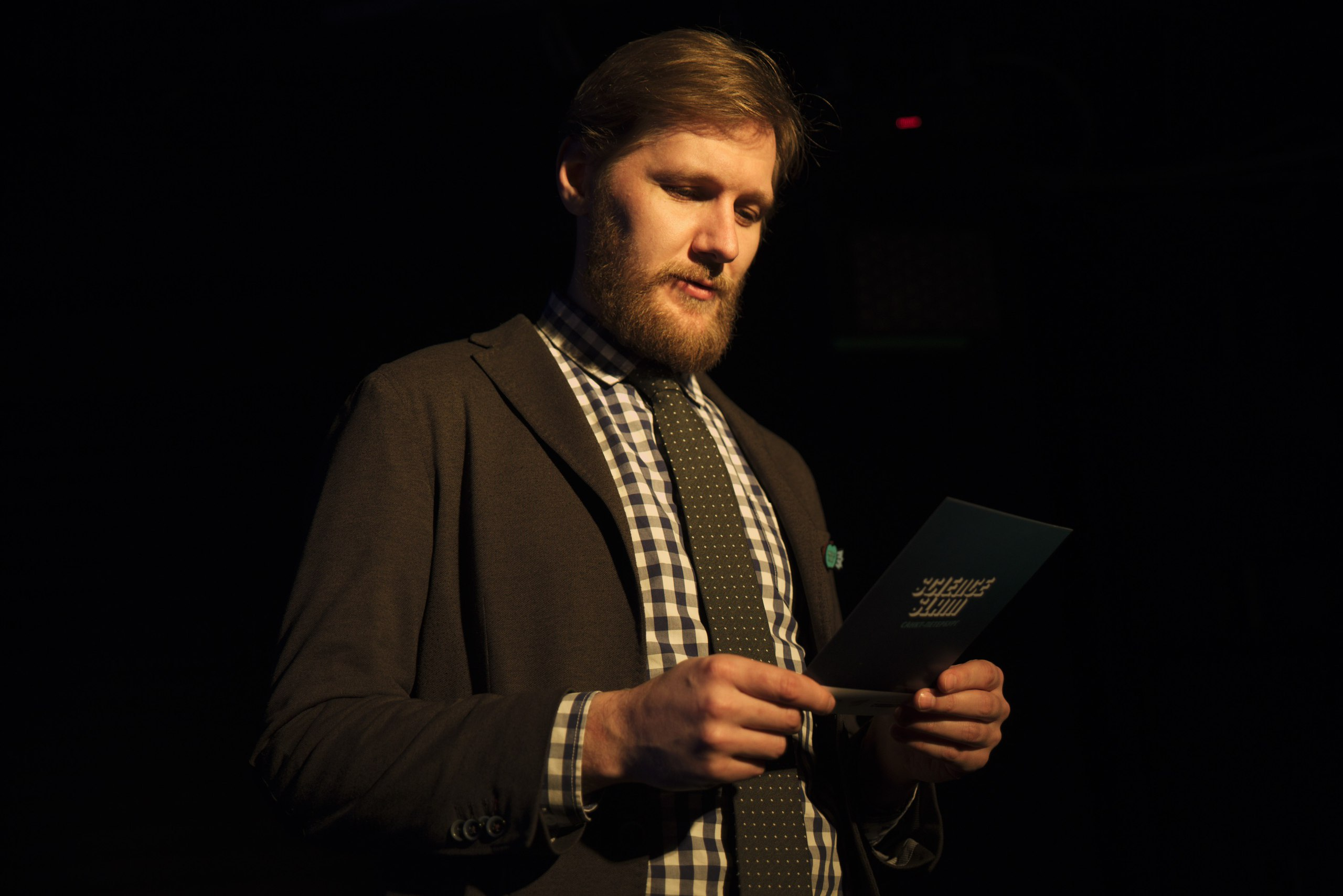 Science Slam Петербург, Зал ожидания. Бессменный ведущий слэма двух столиц Сергей Гаврилов